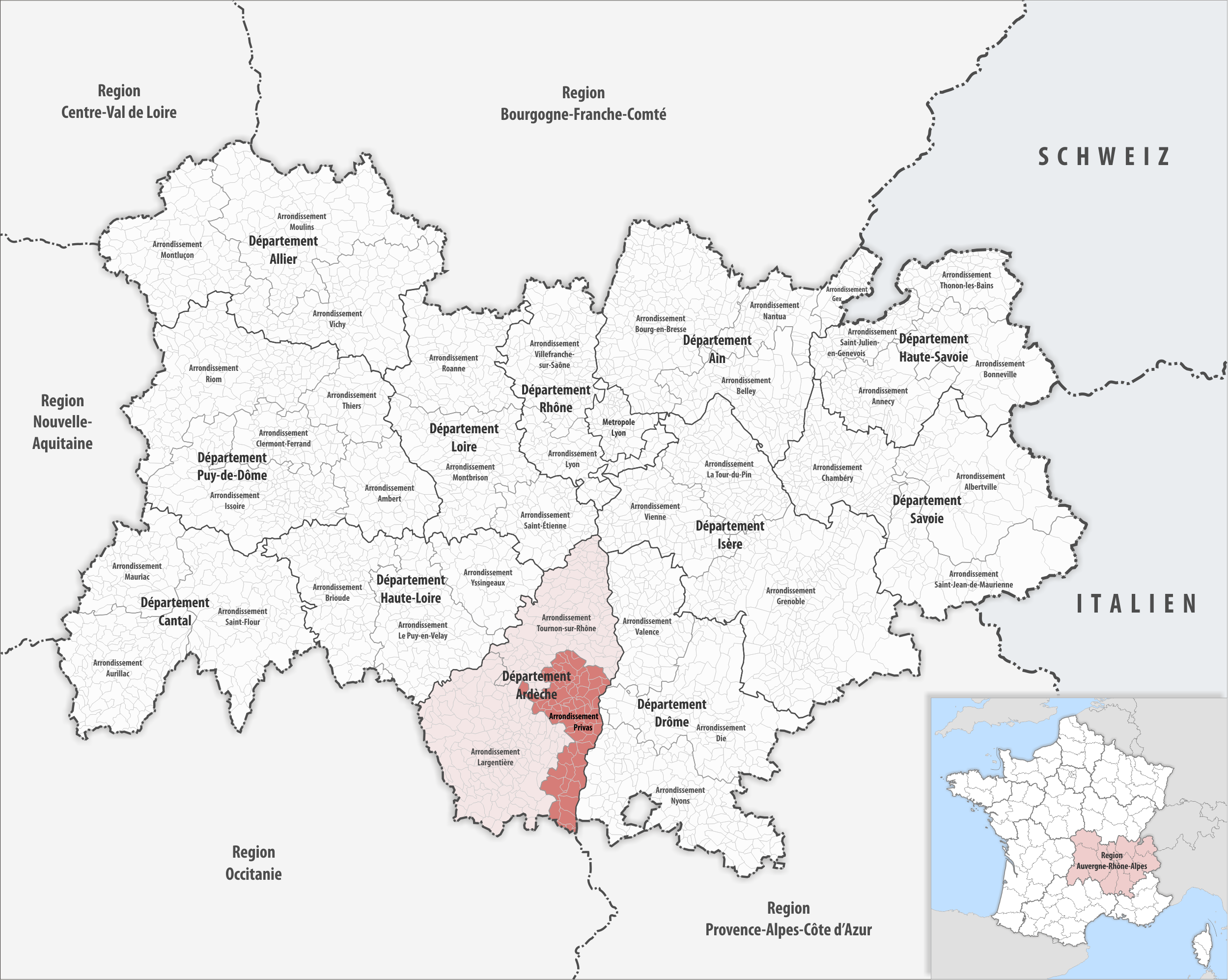 Lage des Arrondissements Privas